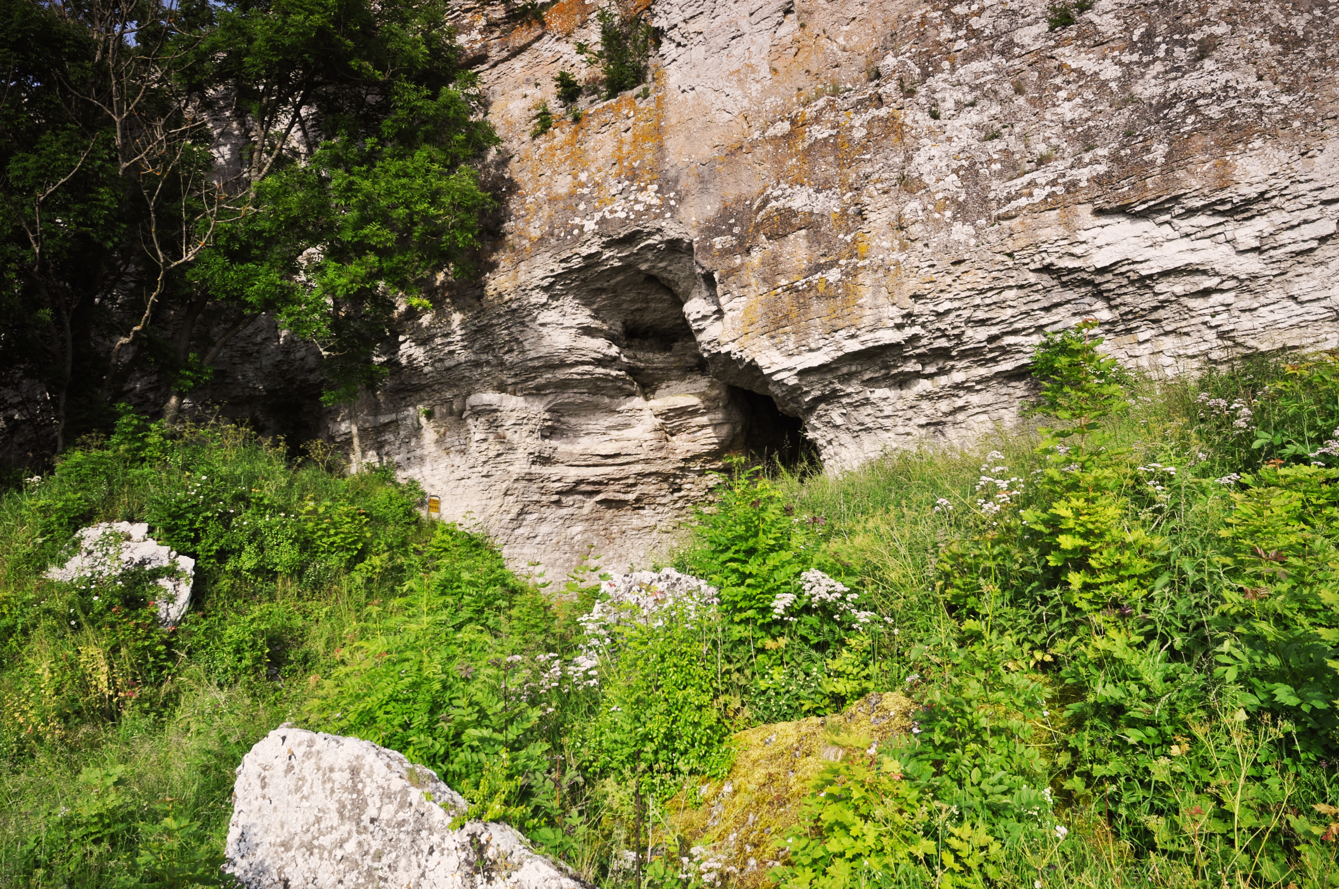 Eksta 217:1 (Boplats). Grottan Stora Förvar, ingången. Stora Karlsö, utanför Gotland.